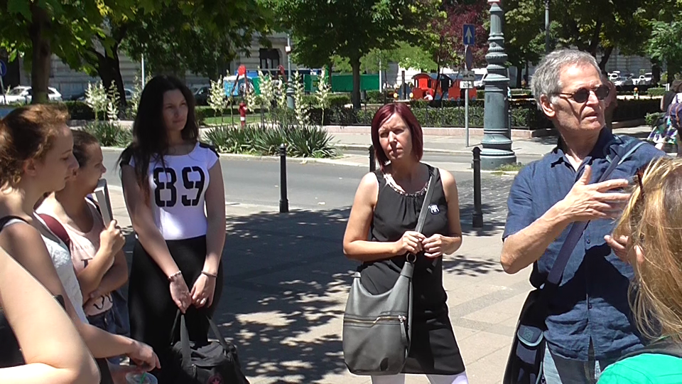 Homoki Andrea és Sebő Gábor gondolatébresztő előadását hallgatják a Közös Nevező program keretében a pécsi Leöwey Klára Gimnázium Arany János Tehetség Programjának néhány diákja az Eleven Emlékműnél